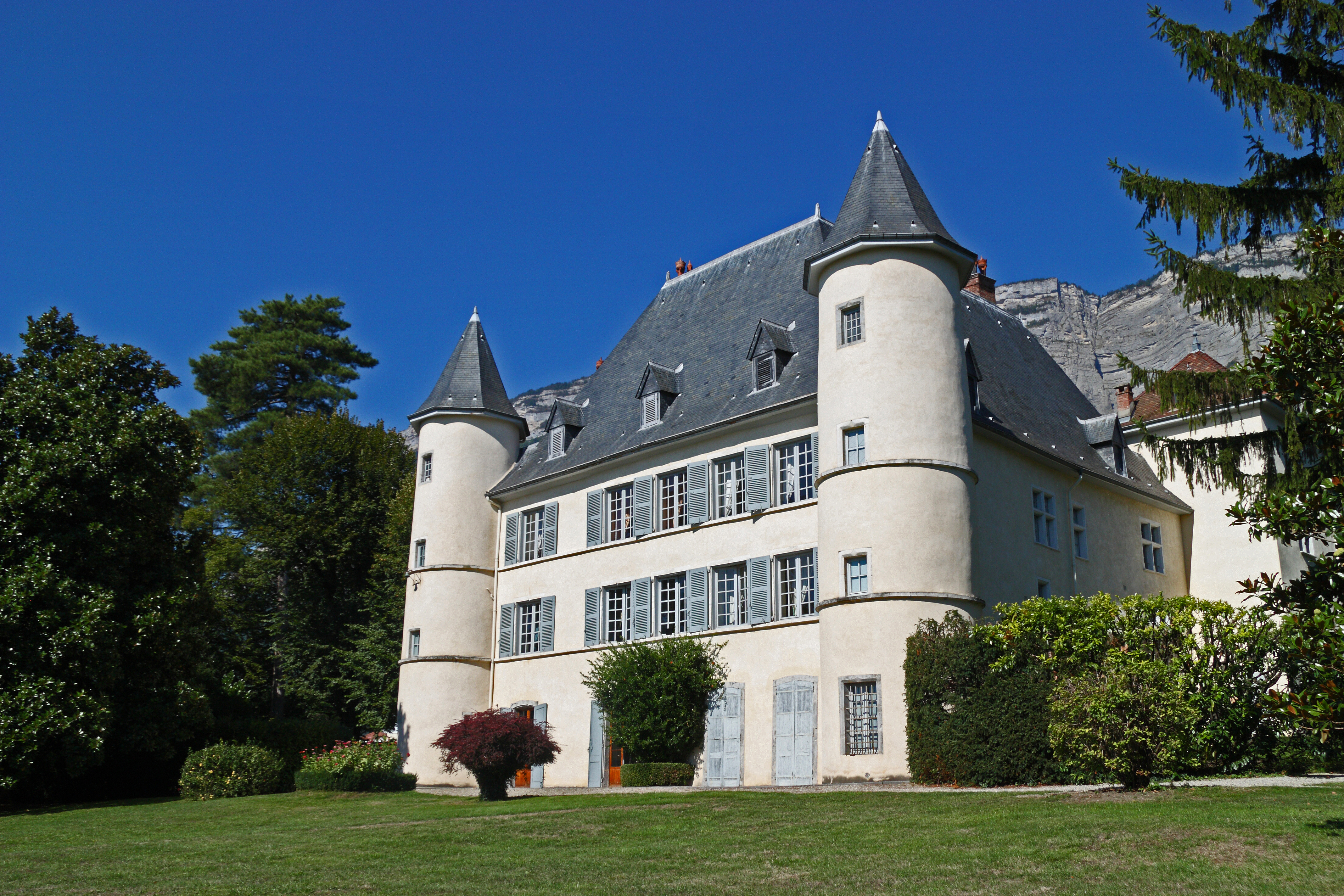 Château de Serviantin, (Inscrit, 1960) .